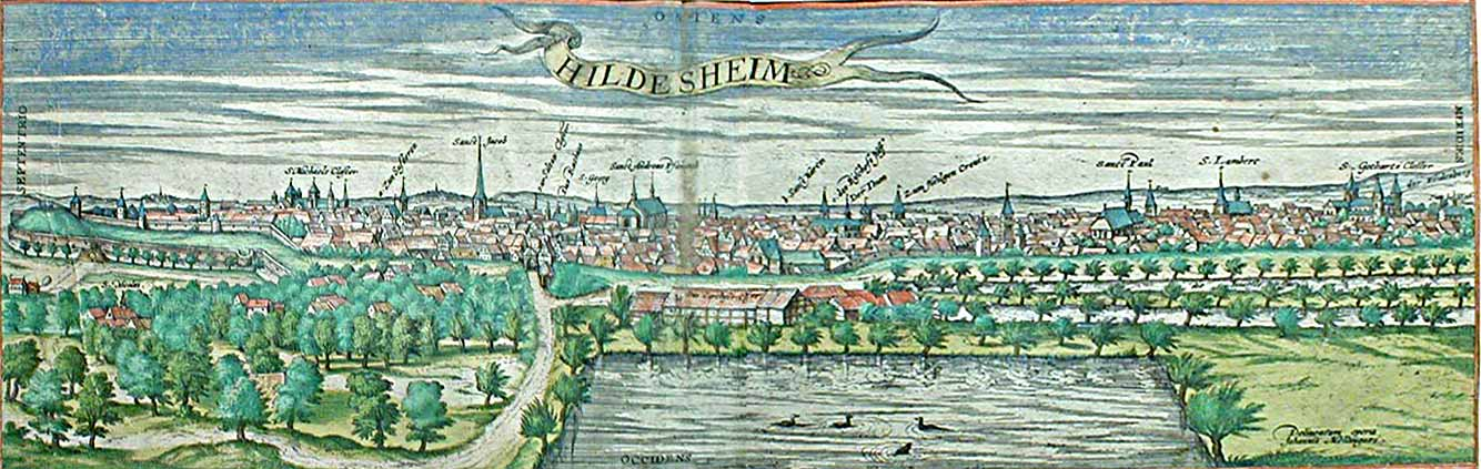 Kolorierter Kupferstich von Hildesheim, 16 Jh.